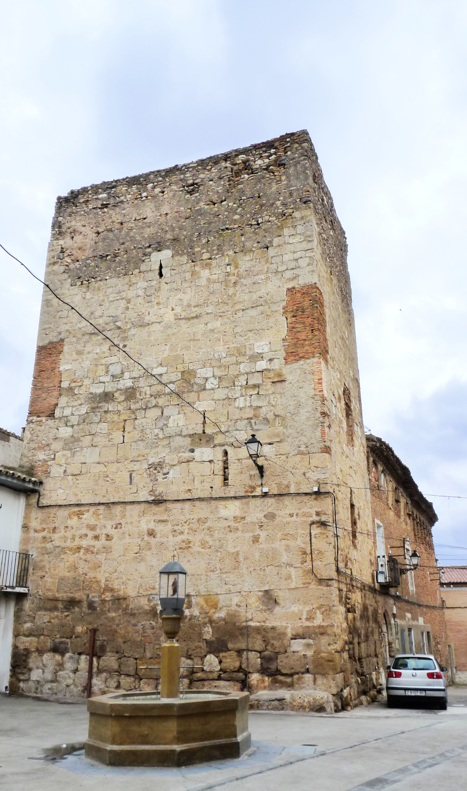 Bulbuente - Torreón del castillo (finales s. XII)